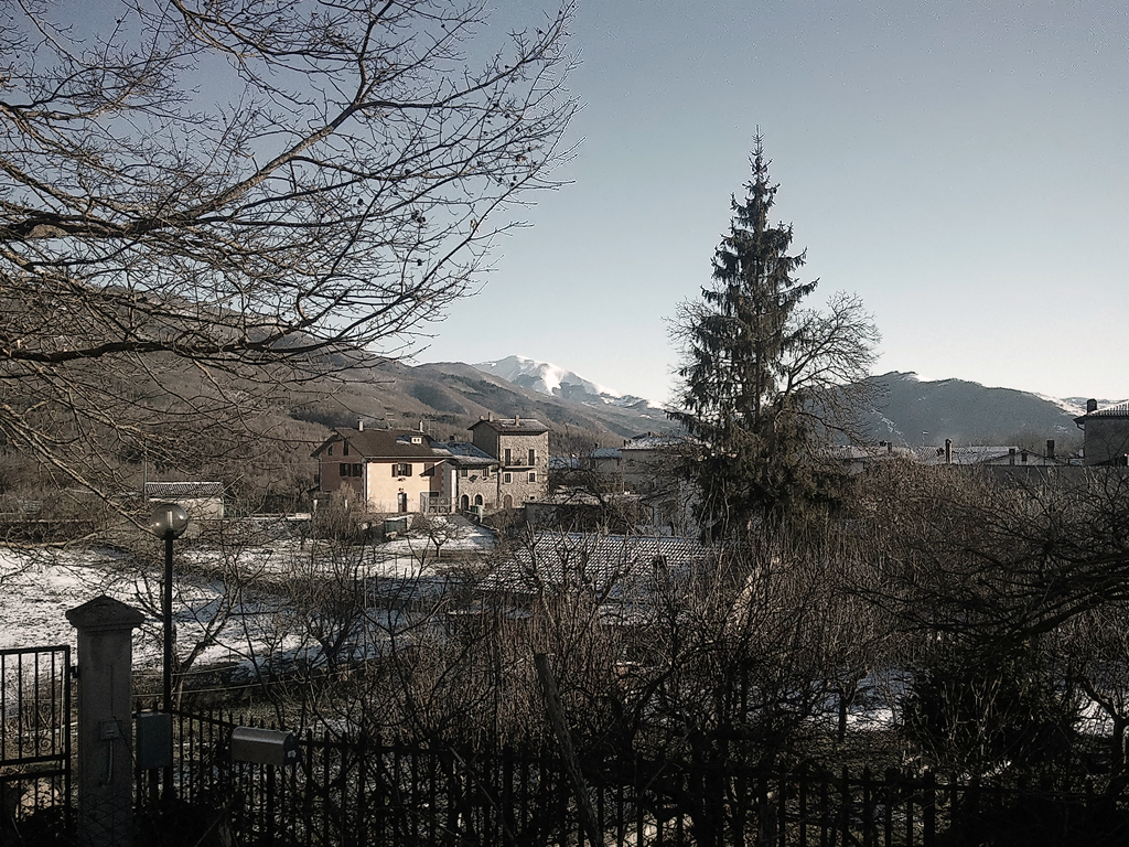 Aringo Dall Strada